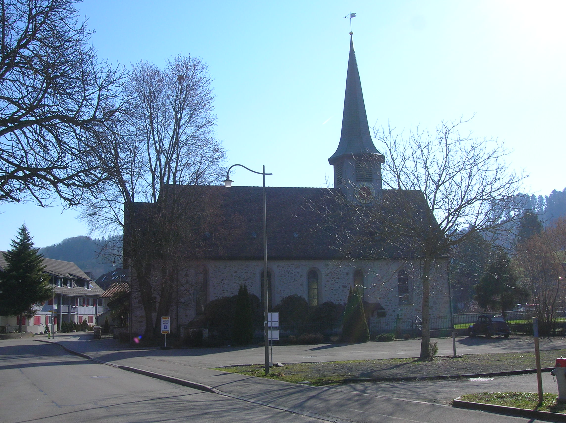 Hittni, Reformierti Chile vo 1708